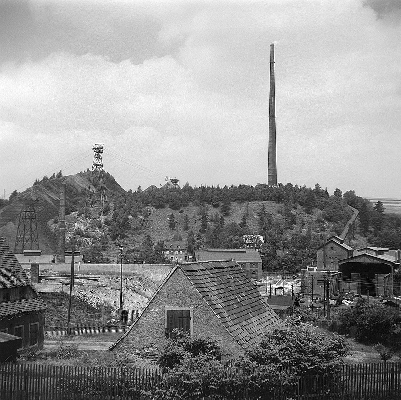 Original image description from the Deutsche Fotothek Halsbrücke. Schornstein des Hüttenwerkes (Halsbrücker bzw. Hohe Esse, 1889, 140m), Blick aus der Ortslage